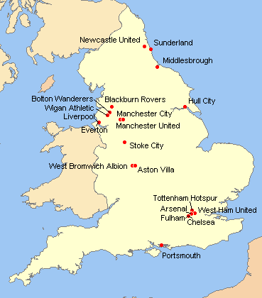 Carte présentant la localisation des clubs de premier league 2008-2009